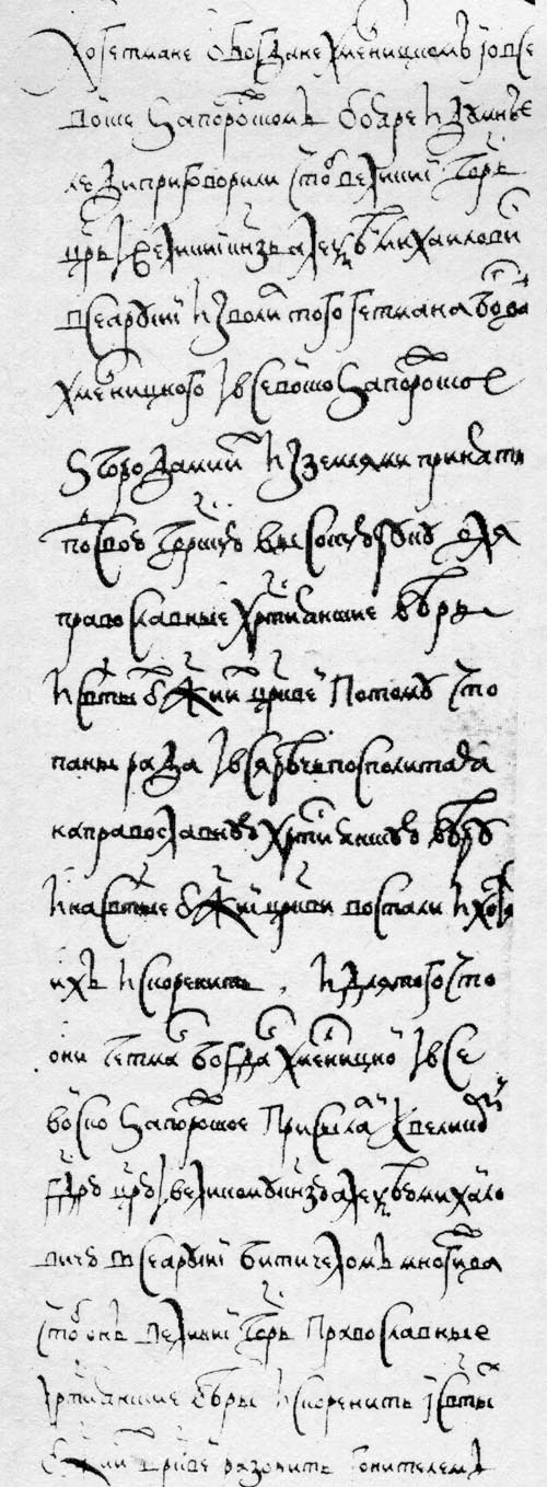 Решение Земского собора о принятии Войска Запорожского под власть русского царя